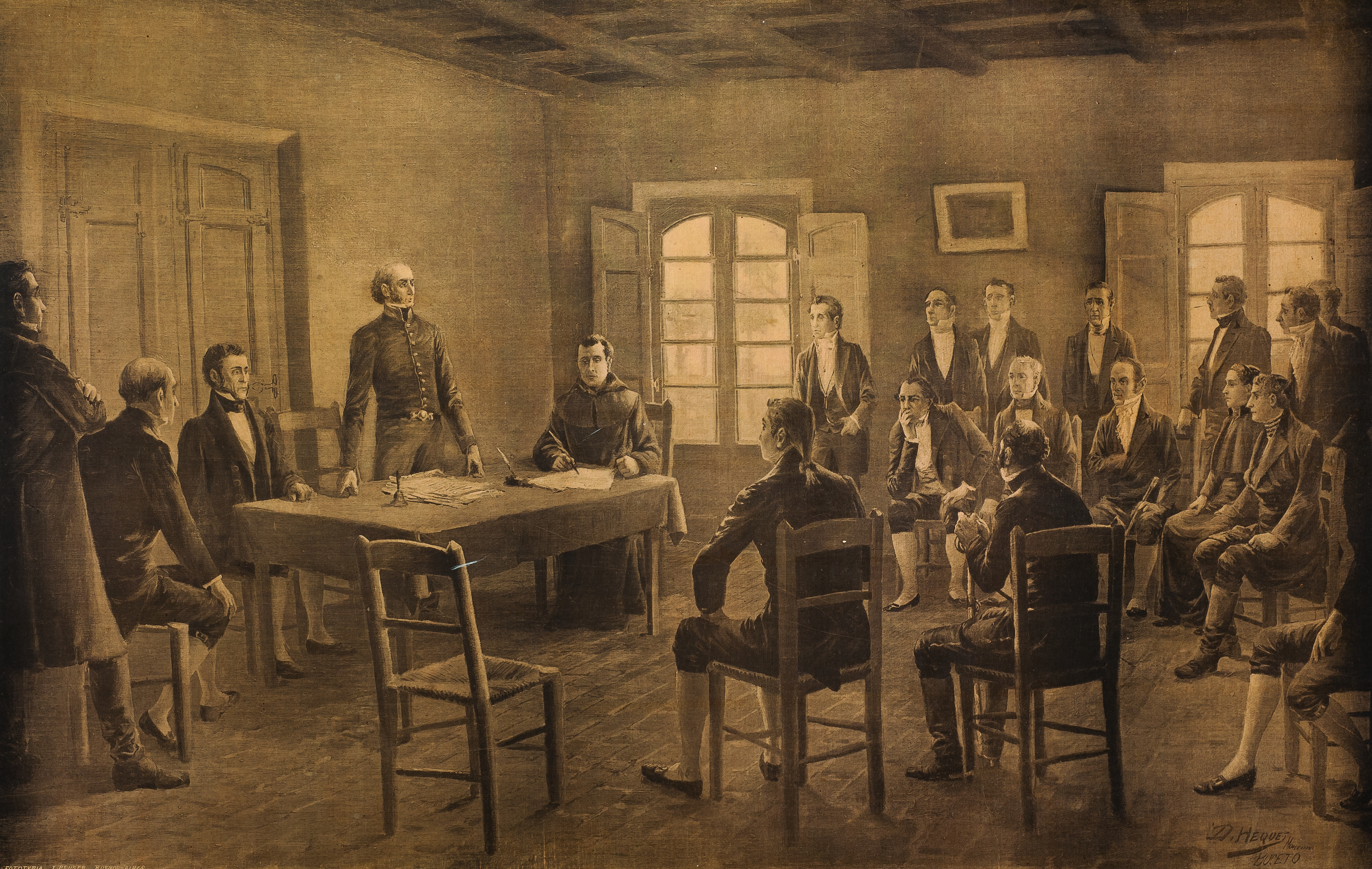 Archivo provisto por el Museo Histórico Nacional de Uruguay en el marco de un proyecto GLAM entre esa institución y Wikimedia Uruguay.